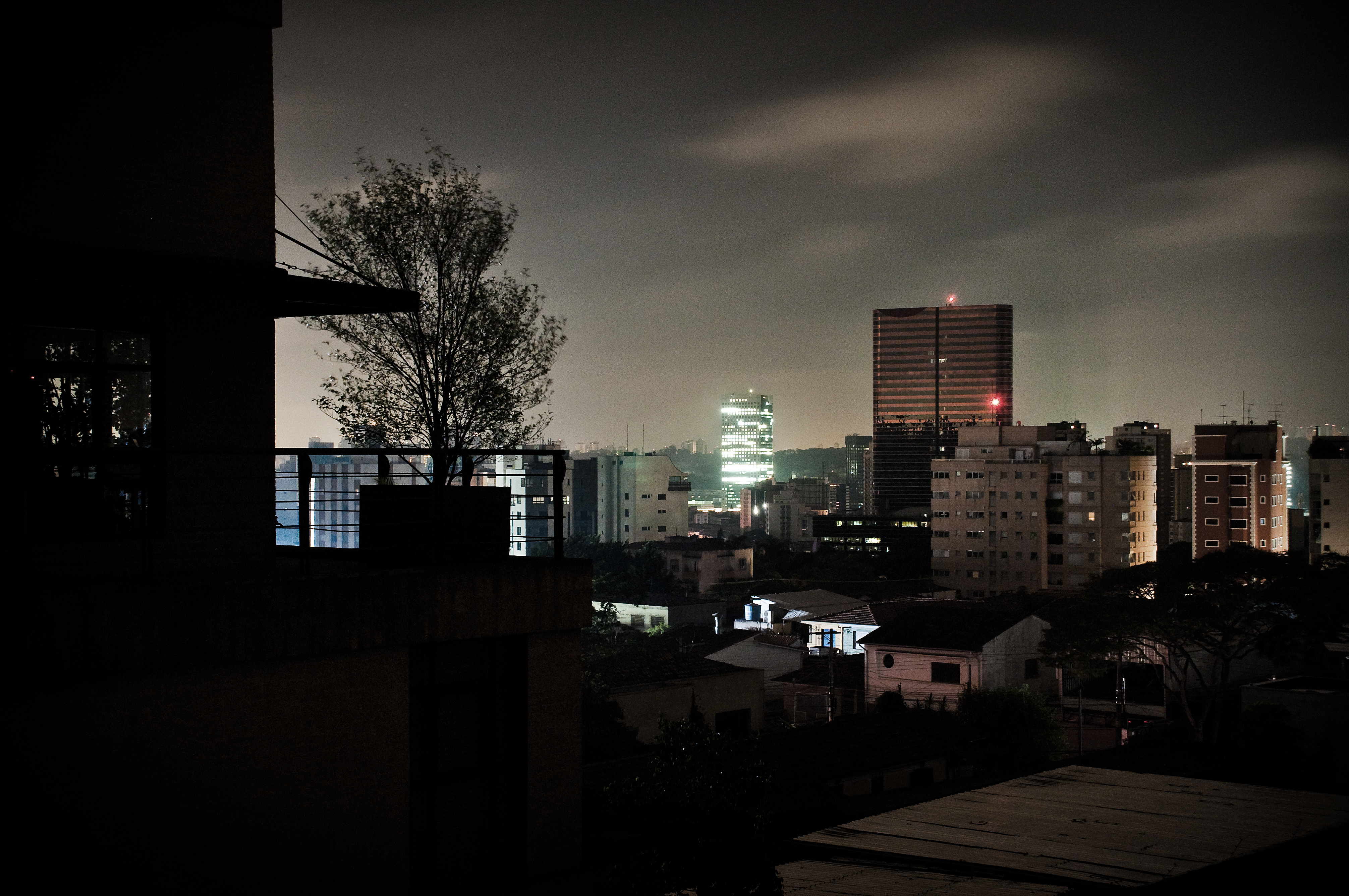 Vila Madalena - Zona Oeste. Alguns prédios estavam iluminados por conta de geradores. O apagão durou aproximadamente 5 horas em São Paulo. 30s de exposição.